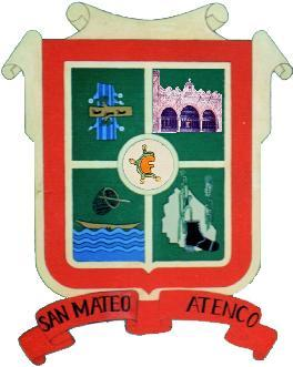 Escudo Municipio San Mateo Atenco, Méx.